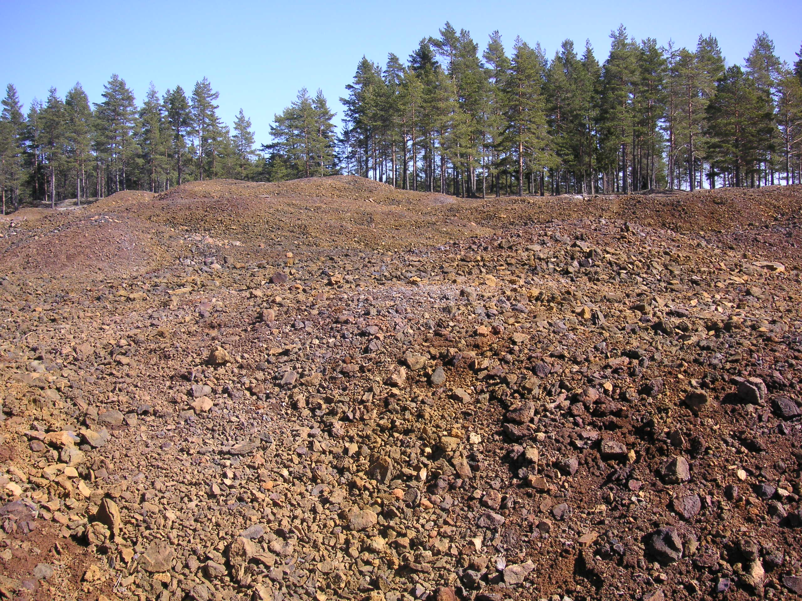 Varphögar vid Östra Silverbergs gruva i Dalarna